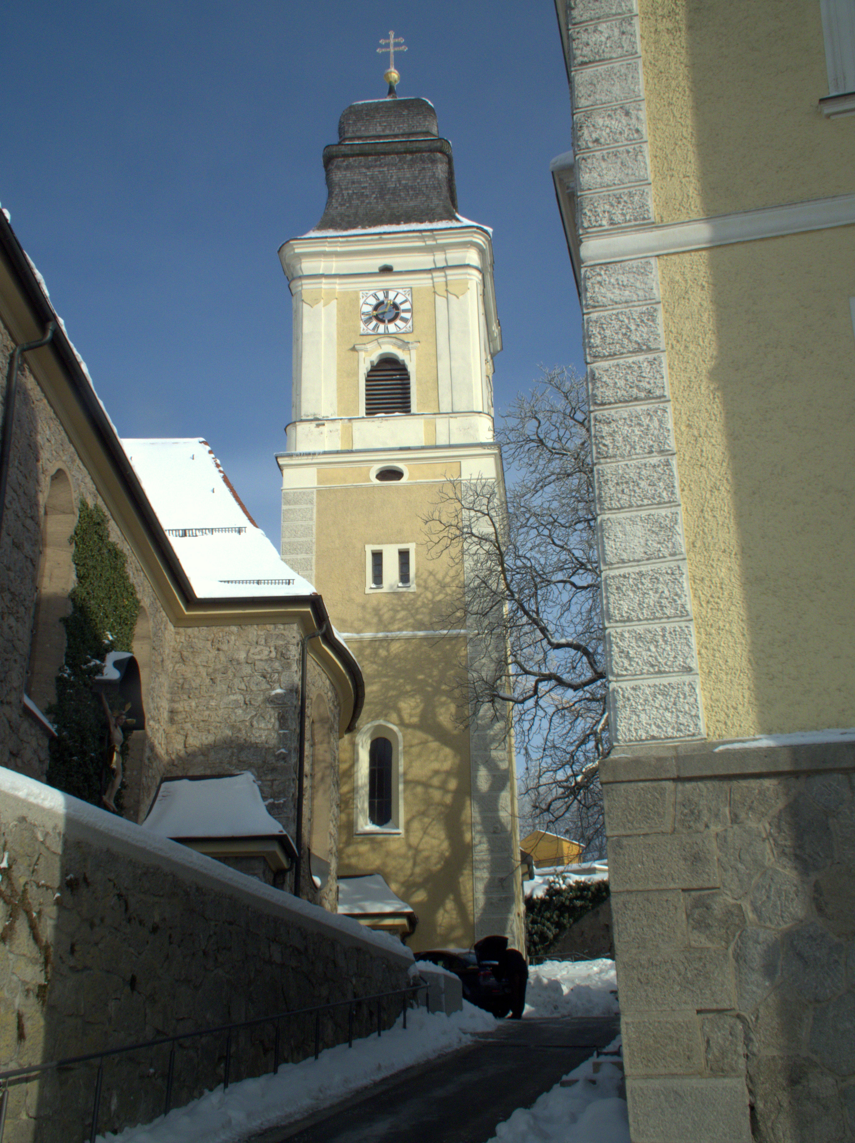 Pfarrkirche St. Andreas in Parsberg